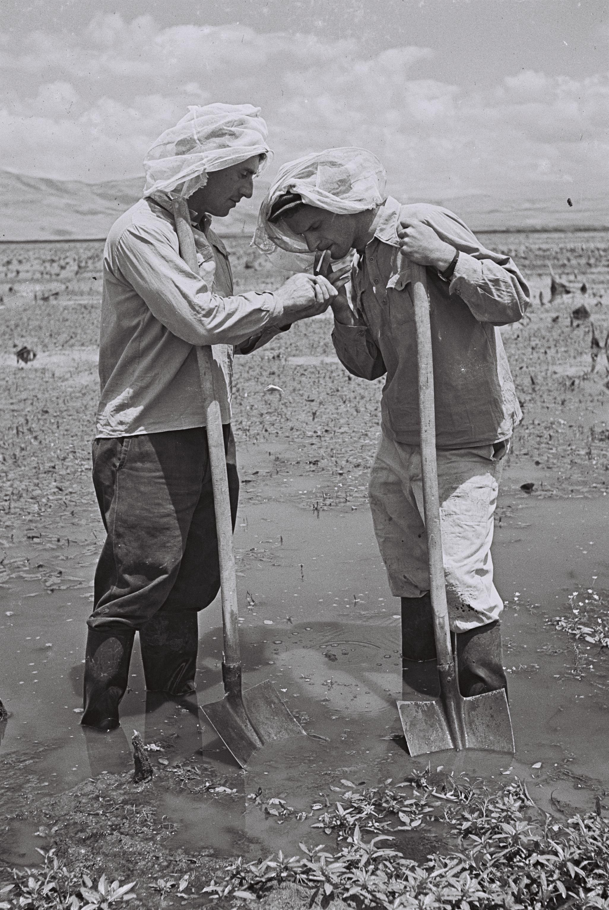 Members of Kibbutz Amir, their heads covered with netting against Malaria flies, work in the Hule Swamps. חברי קיבוץ עמיר עובדים בביצות החולה כשעל ראשם רשתות להגנה מפני יתושי המלריה